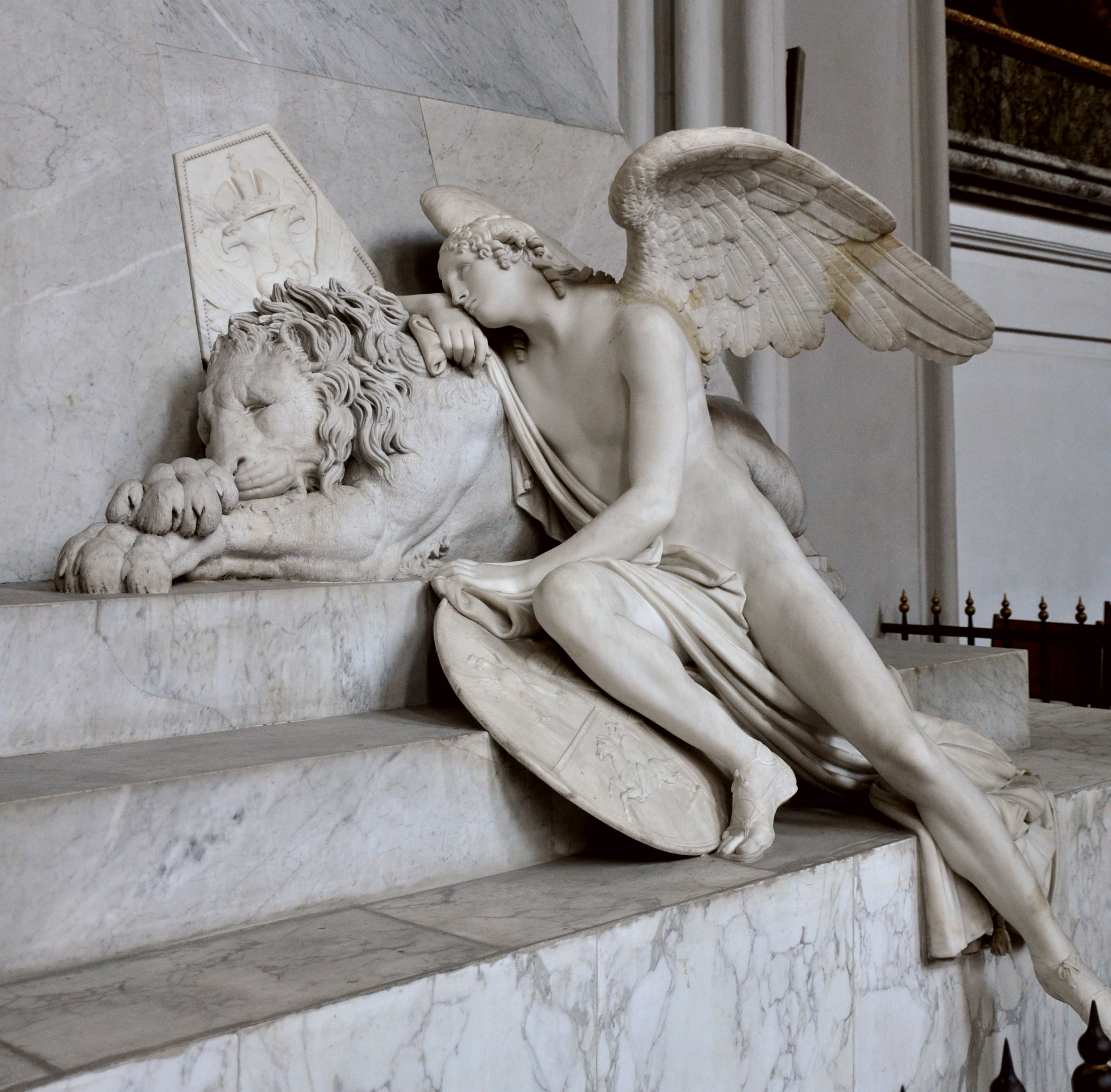 Wien, Augustinerkirche, Grabdenkmal für Erzherzogin Marie Christine von Antonio Canova, 1805 Trauernder Engel mit Schild und Löwe